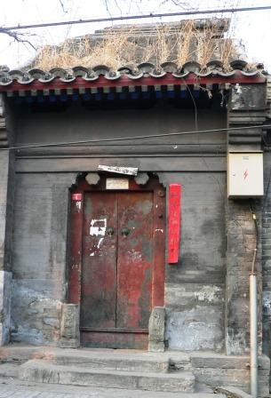 如意门 拍摄